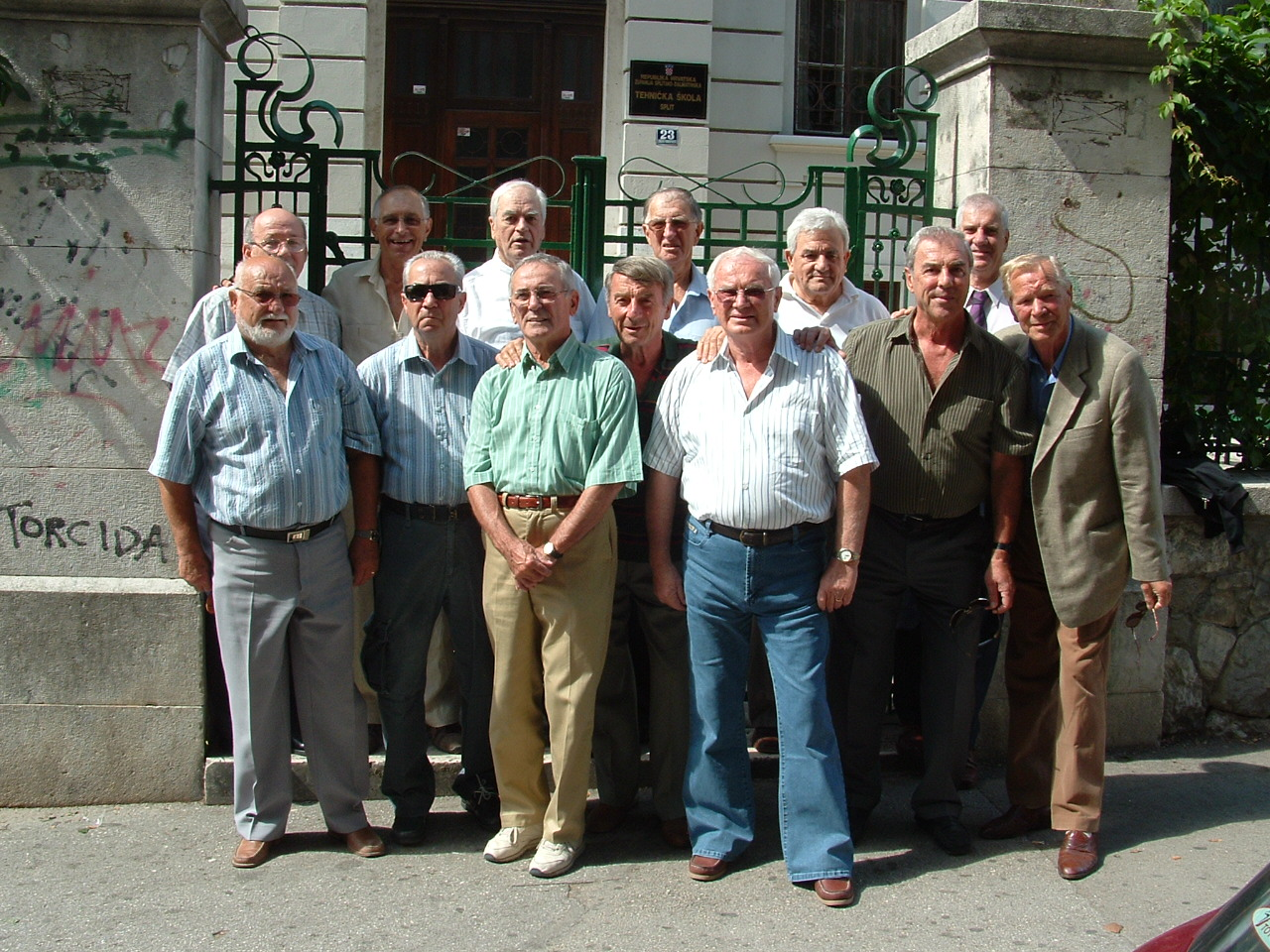 Frane Fingušt, enigmat